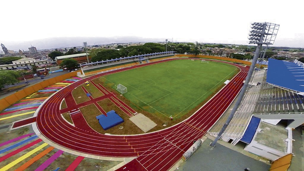 Estadio Francisco Rivera Escobar, ubicado al interior de la Ciudadela Deportiva "Ramiro Echeverri Sánchez"